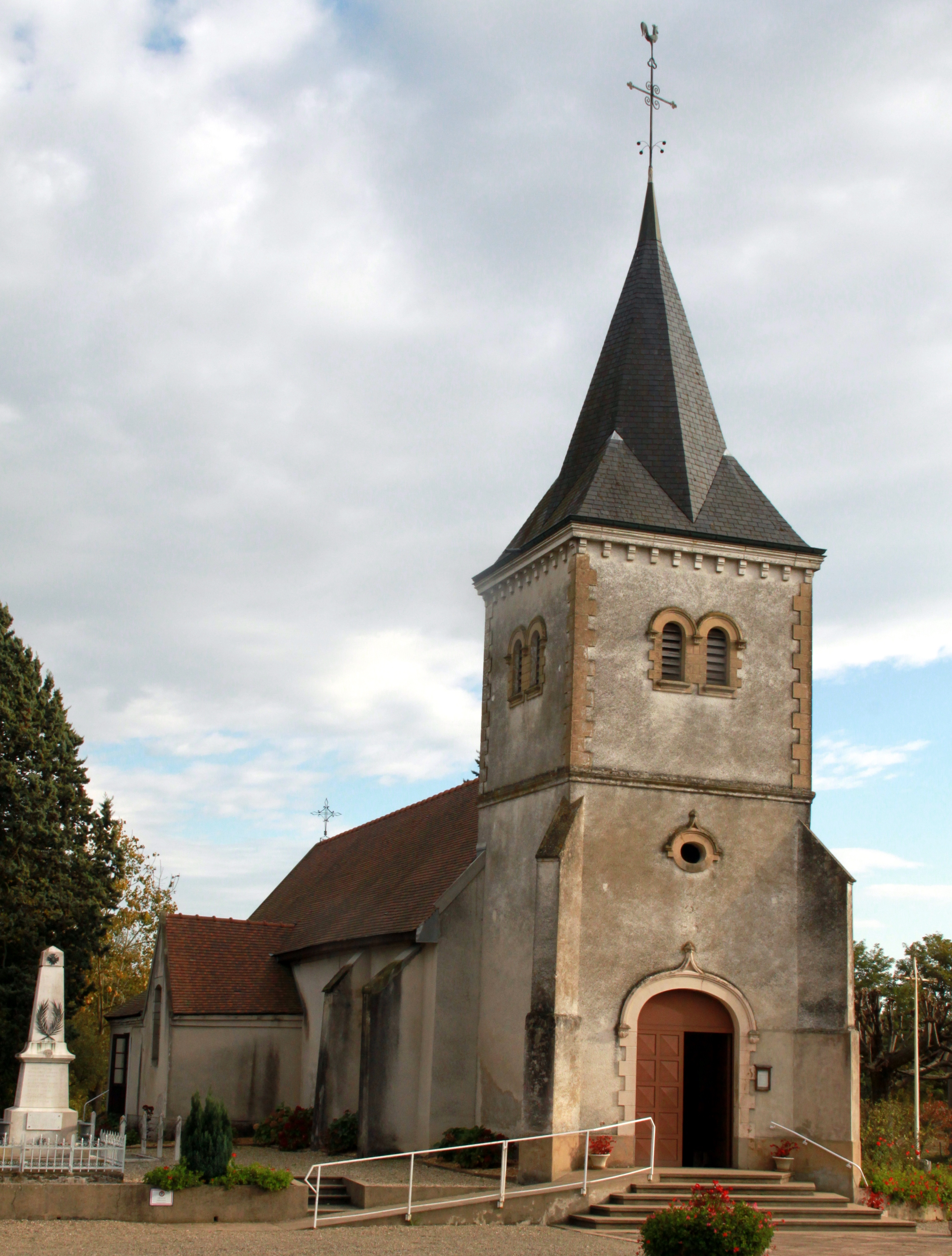 La Chaux (71) Kirche